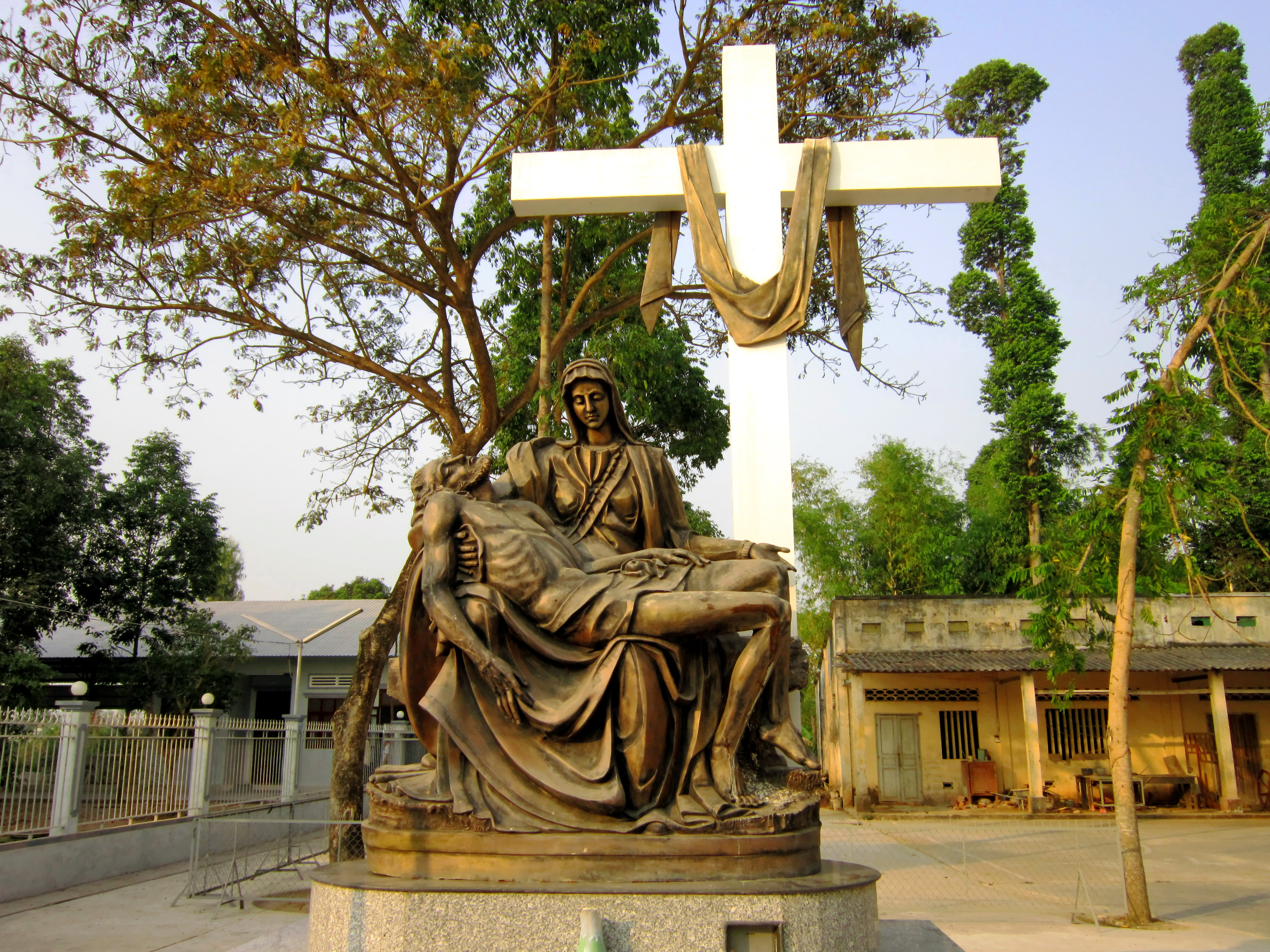 Tượng Đức Mẹ Sầu Bi (miêu tả cảnh Đức mẹ Maria ôm xác Chúa Giêsu) ở nhà thờ Năng Gù (An Giang, Việt Nam), làm theo mẫu tượng Đức Mẹ Sầu Bi của Michelangelo trong Vương Cung Thánh Đường Thánh Phêrô ở Vatican.